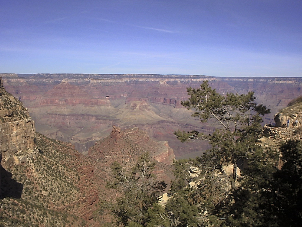 Tatt bildet selv i Oktober 2005. Bildet er tatt fra sørkanten av Grand Canyon, nordover.